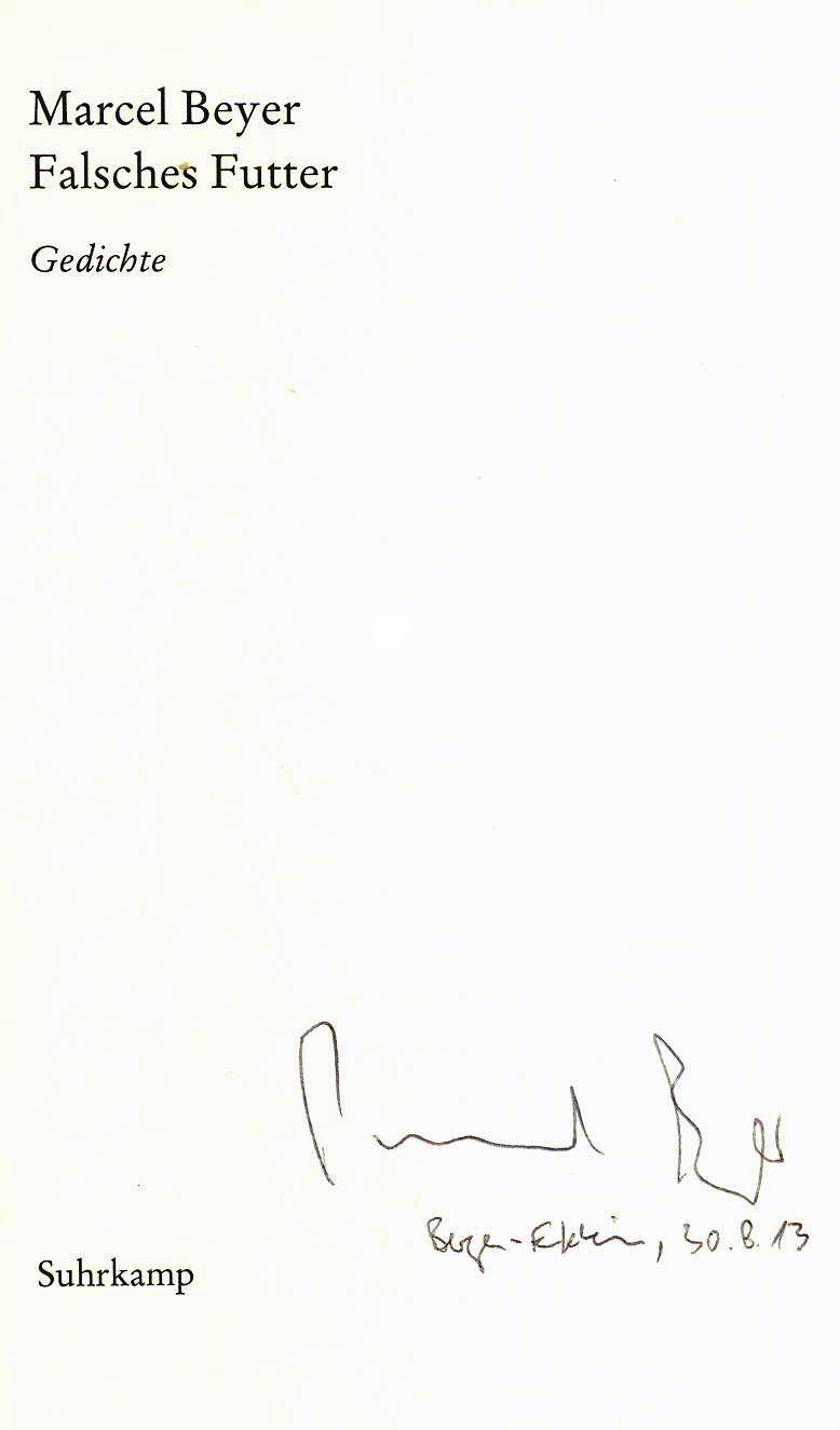 Autograph von Marcel Beyer, 2013 in Ffm-Bergen-Enkheim